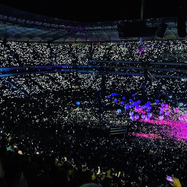 Koncert Taco Hemingway na Stadionie Narodwym, 2019